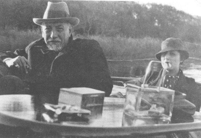 Una gita alle foci del Paranà (Rìo de la Plata) nel settembre del 1933.